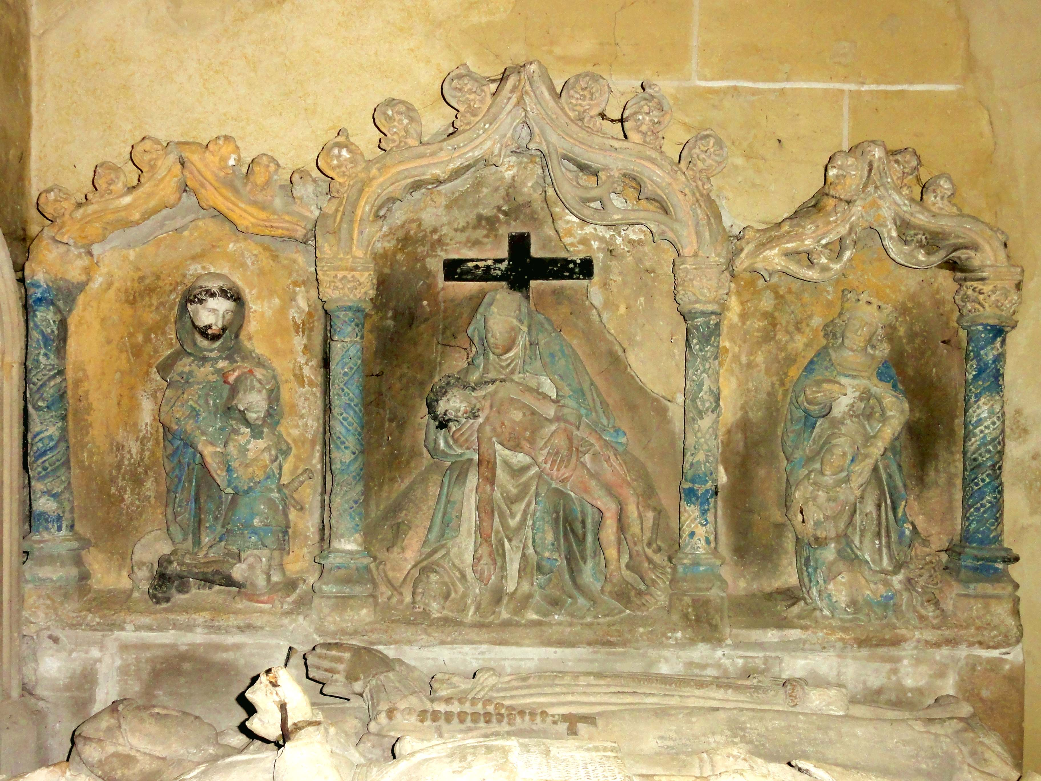 Monument funéraire de Jean Chenu et de sa femme - retable du XVIe s. provenant de la chapelle Saint-Antoine du couvent des Célestins.